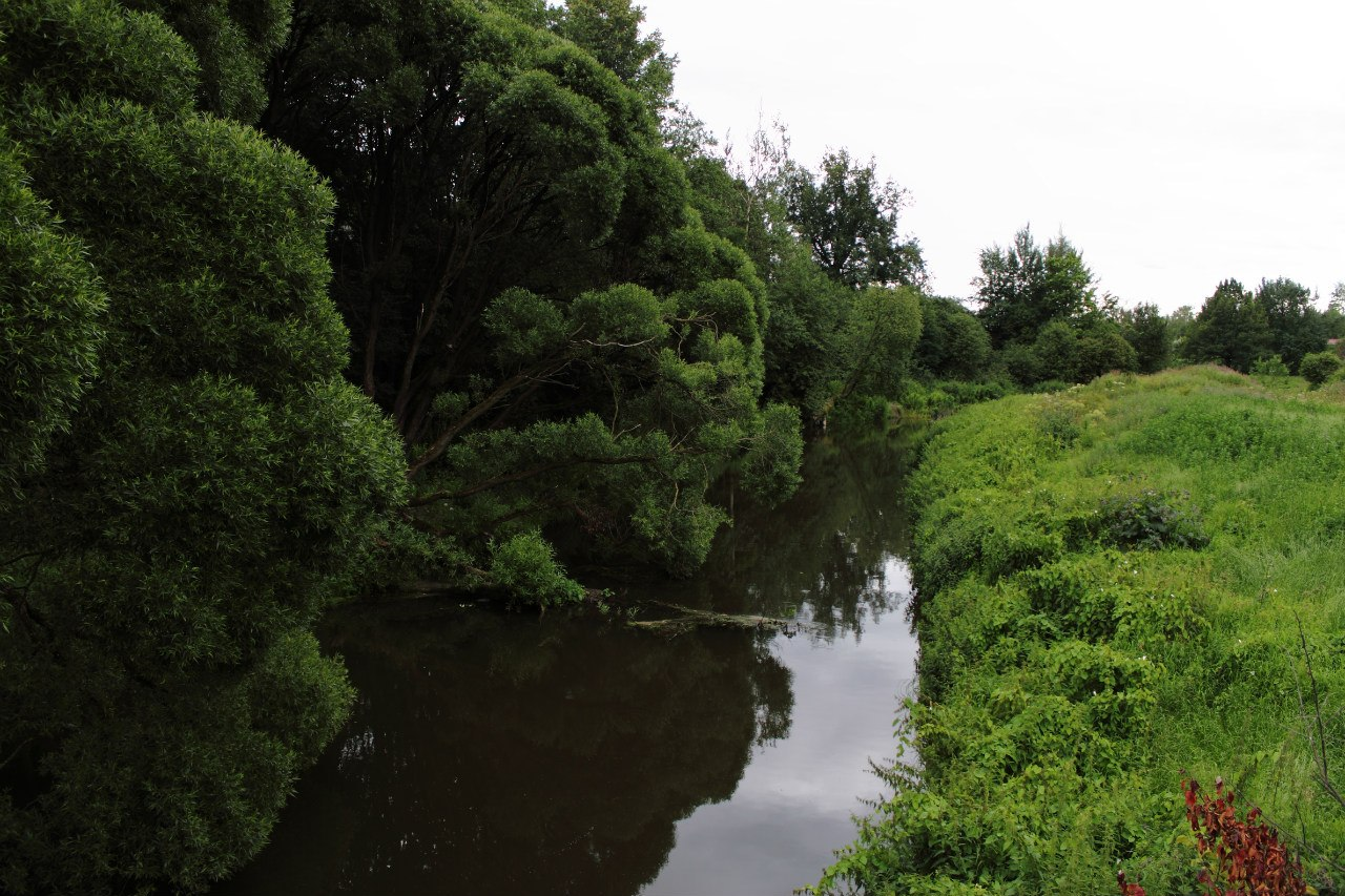 Славянка в районе Петро-Славянки (5.4 км. от впадения в Неву)